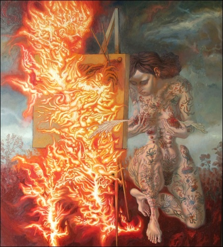 Станковая картина, холст, масло